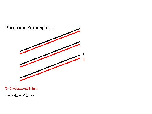 selbst gezeichnet